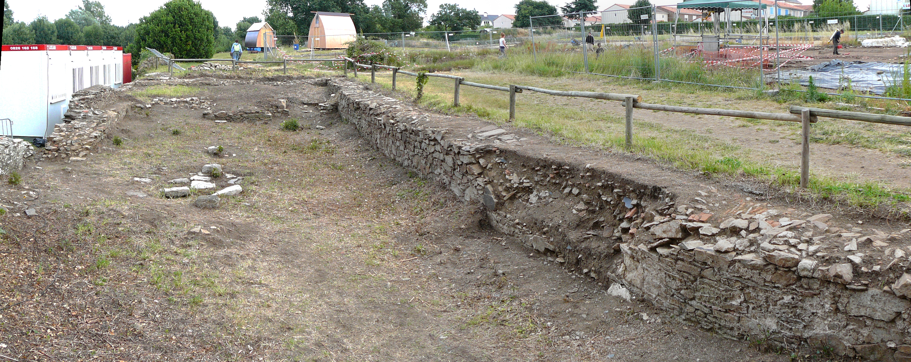 Mur gallo romain dégagé sur le site de St Lupien .